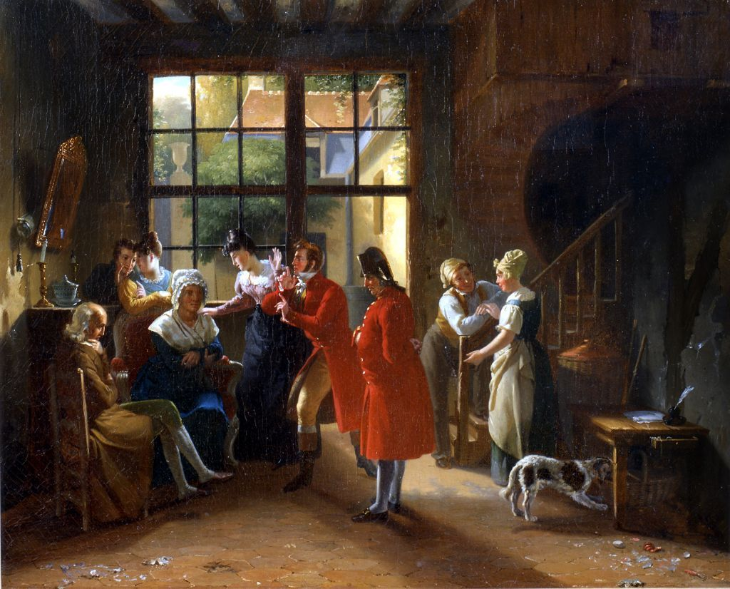 Les Cancans chez la portiere (gossipers at the door), Pierre Duval le Camus, musée d'Art et d'Histoire de Narbonne